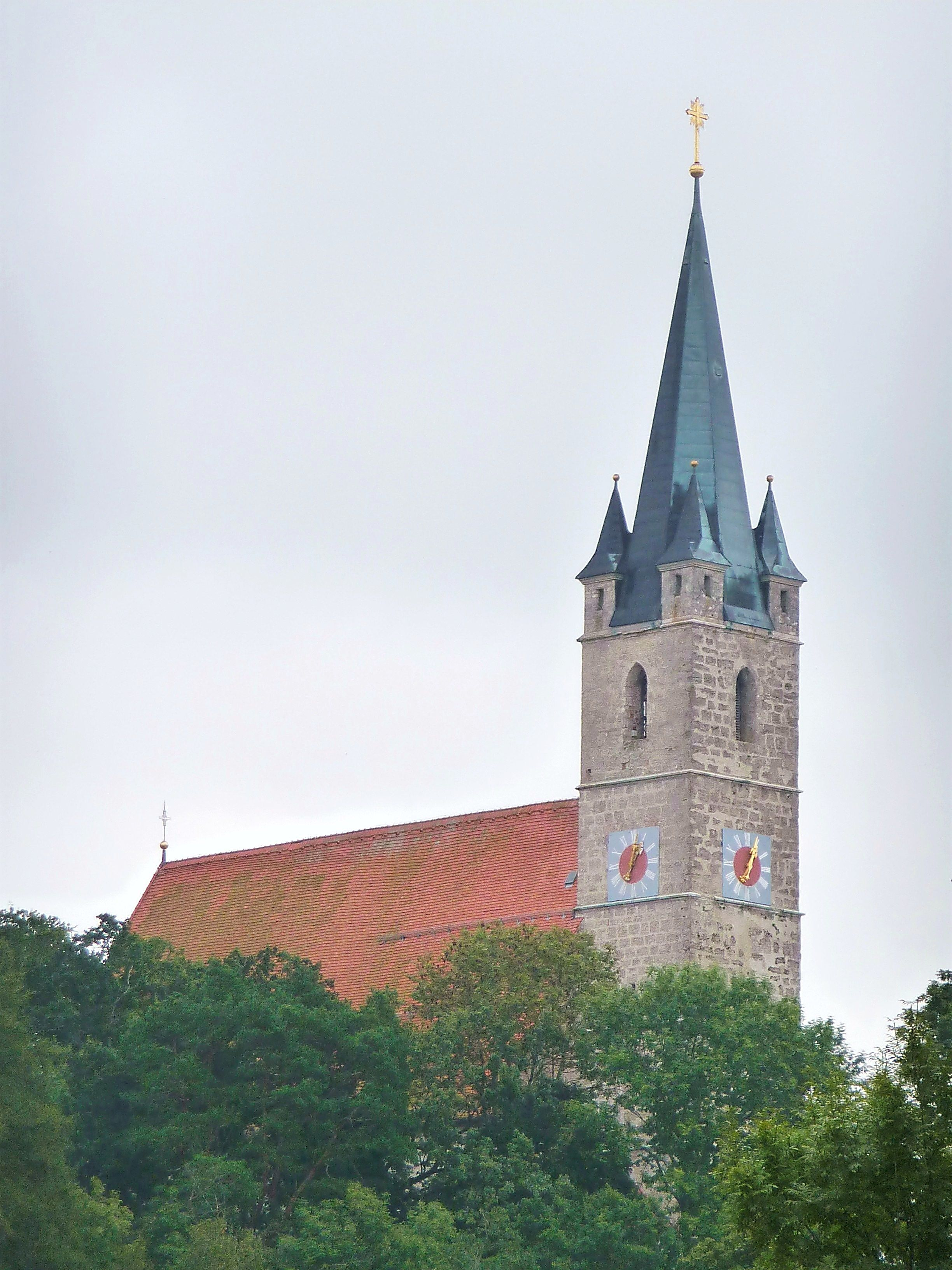 Die Pfarrkirche St. Rupertus in Burgkirchen am Wald, Gemeinde Tüßling